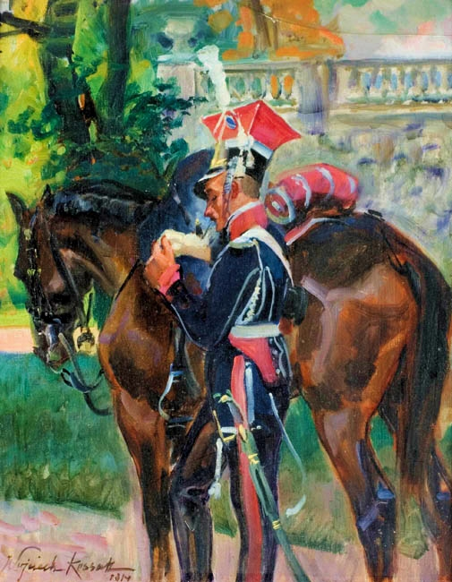 Uhlan avec son cheval, huile sur toile, 51 x 40,5 cm. Un lancier polonais de la Garde fumant sa pipe aux côtés de son cheval. L'aiguillette portée à gauche indique que la scène se passe après la campagne d'Autriche de 1809, à l'issue de laquelle le régiment des chevau-légers polonais de la Garde est doté de la lance.